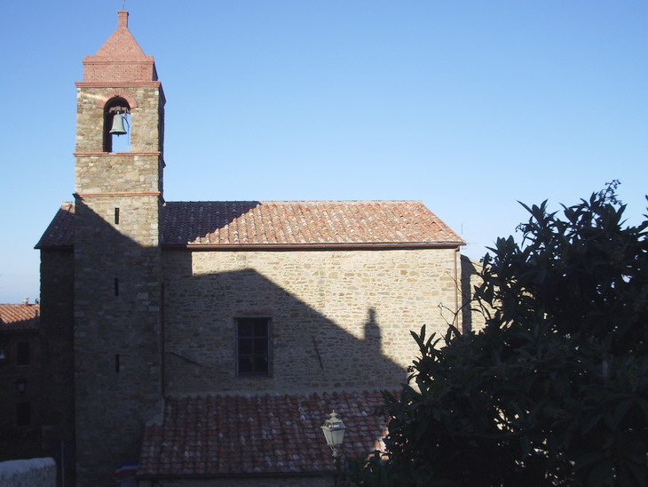 Il fianco laterale destro della Chiesa di San Martino a Scarlino